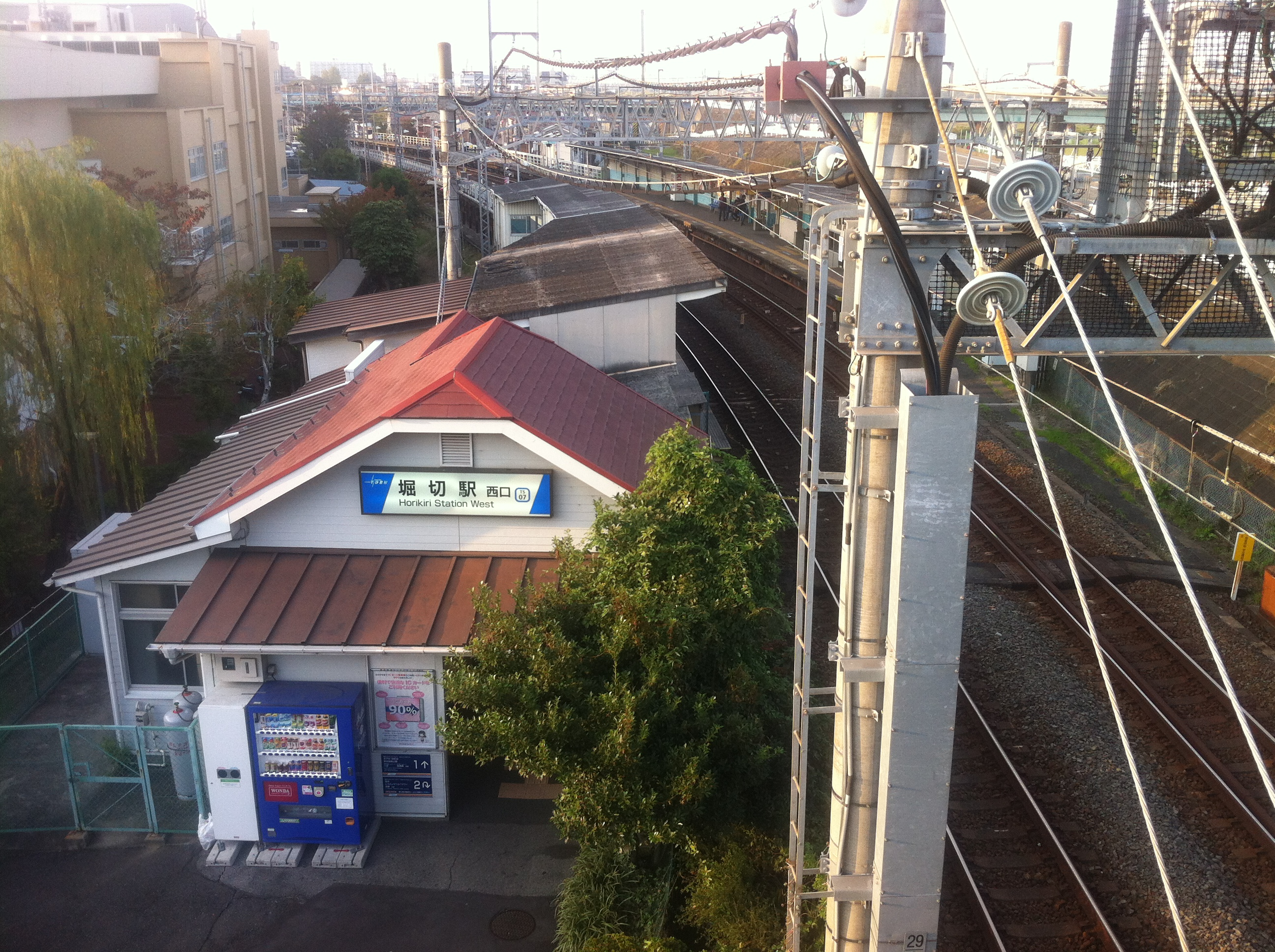 堀切駅 (Horikiri Station)